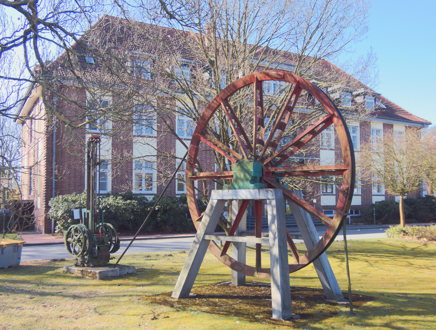 Teufenanzeiger und Seilscheibe des Schachts III des ehemaligen Kaliwerks Hansa. Das ehemalige Verwaltungsgebäude des Kaliwerks dahinter dient heute als Rathaus der Stadt Ronnenberg.